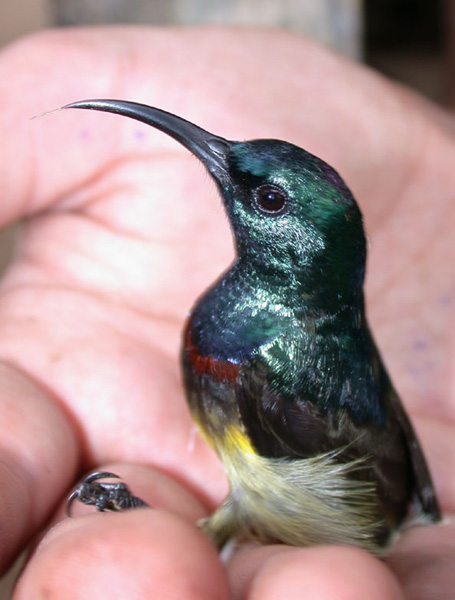 Souimanga Sunbird (Cinnyris sovimanga)